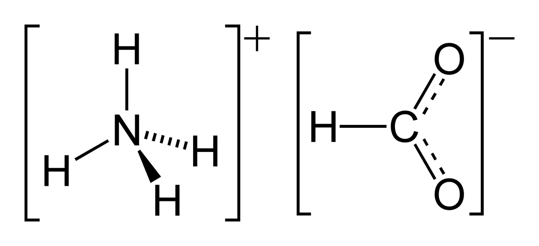 Structural formula of ammonium formate